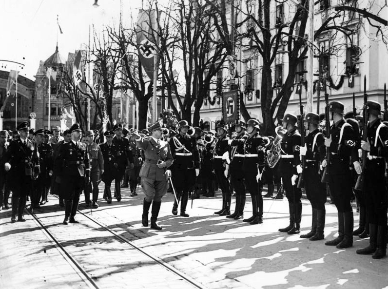 Der Führer in Klagenfurt Der Führer schreitet nach seinem Eintreffen auf dem Hauptbahnhof die Front der Ehrenkompanie der Leibstandarte ab. Fo.: Wag. 5.4.38 4607-38